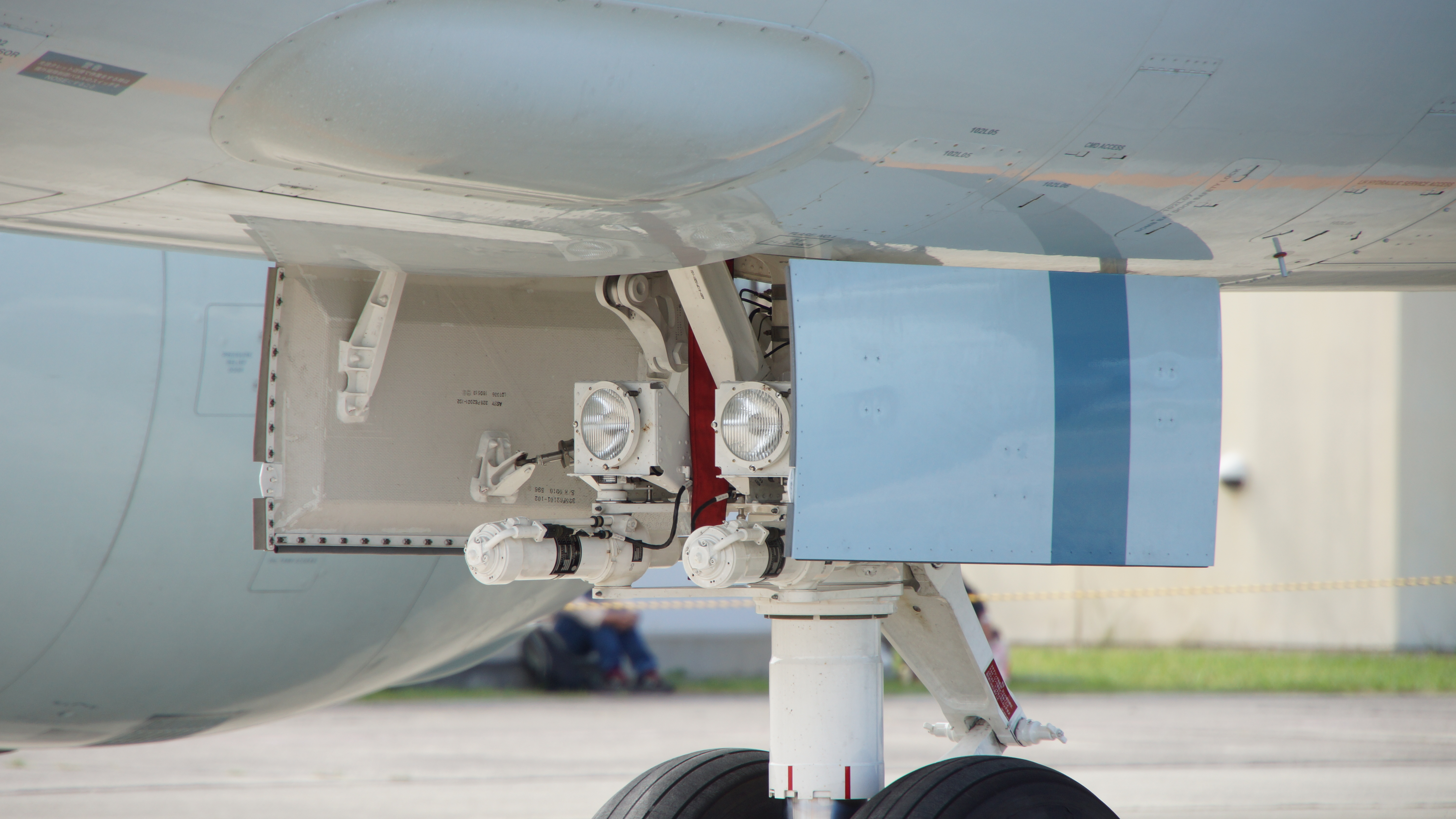 海上自衛隊 P-1哨戒機（5512号機） タクシー灯。2017年9月30日 徳島航空基地にて。